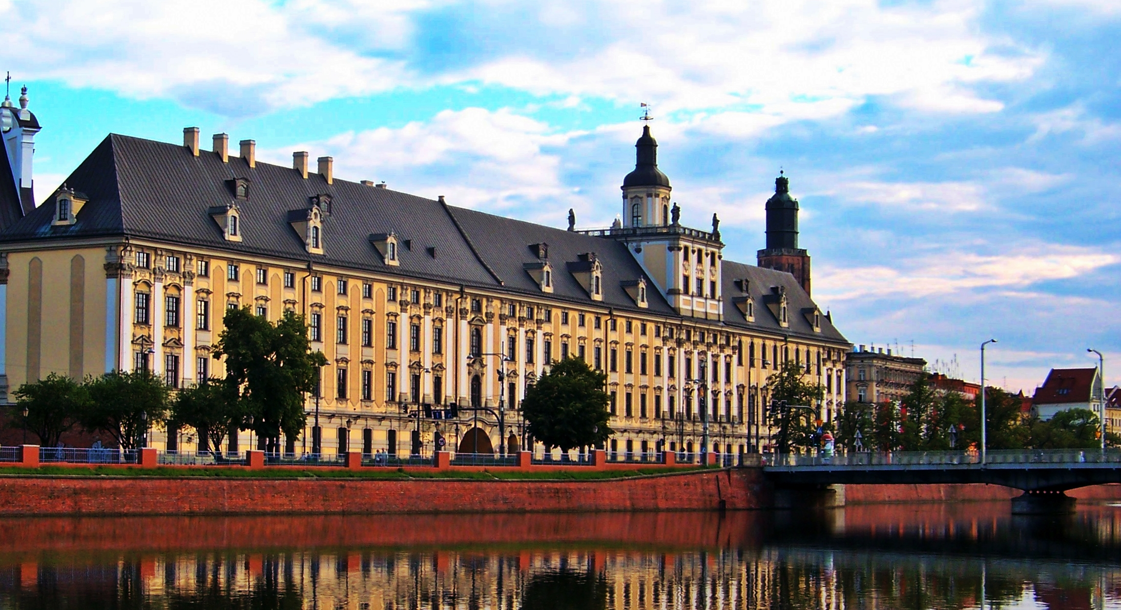 Uniwersytet Wrocławski, d. Kolegium Jezuickie